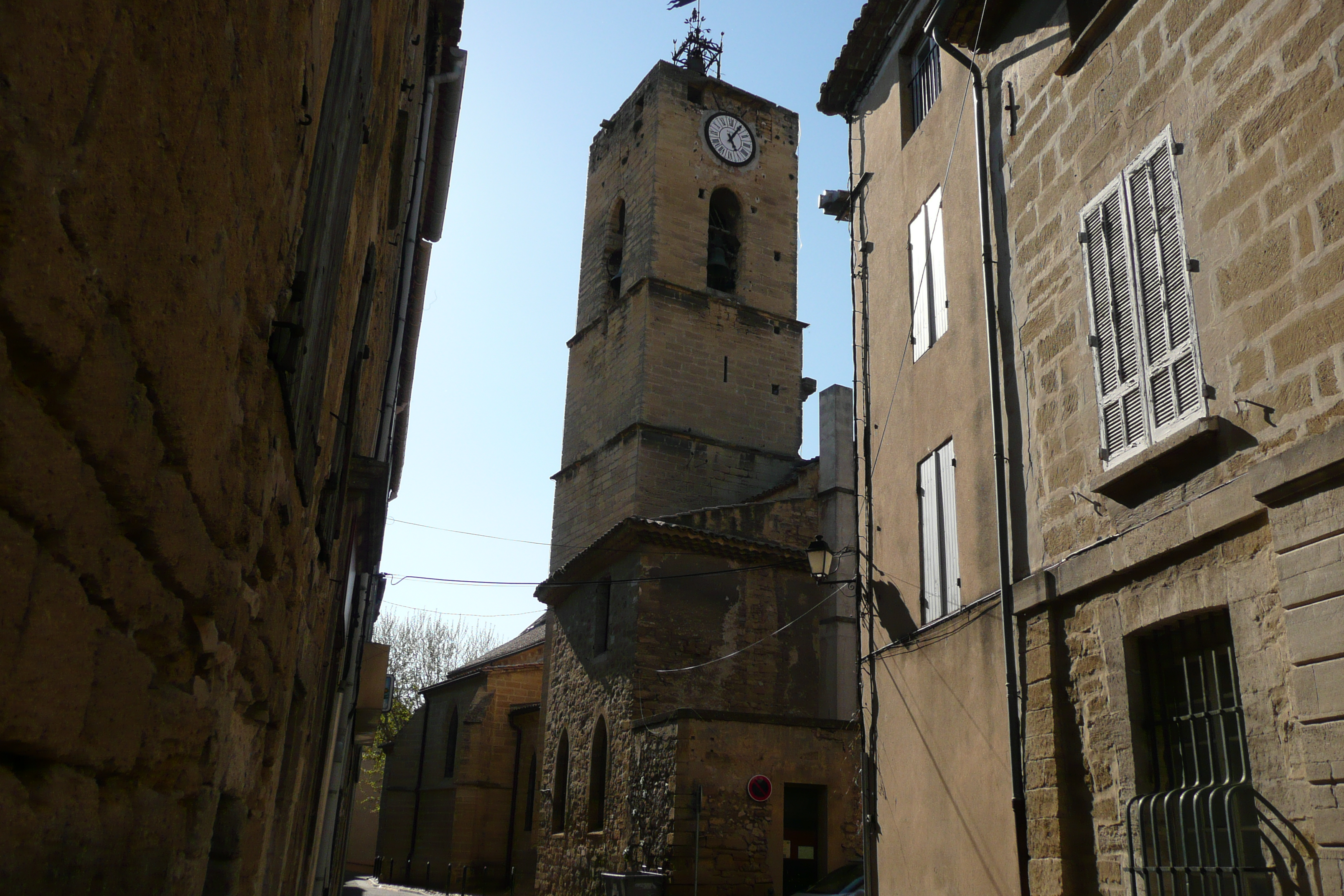 Église à Roquemaure